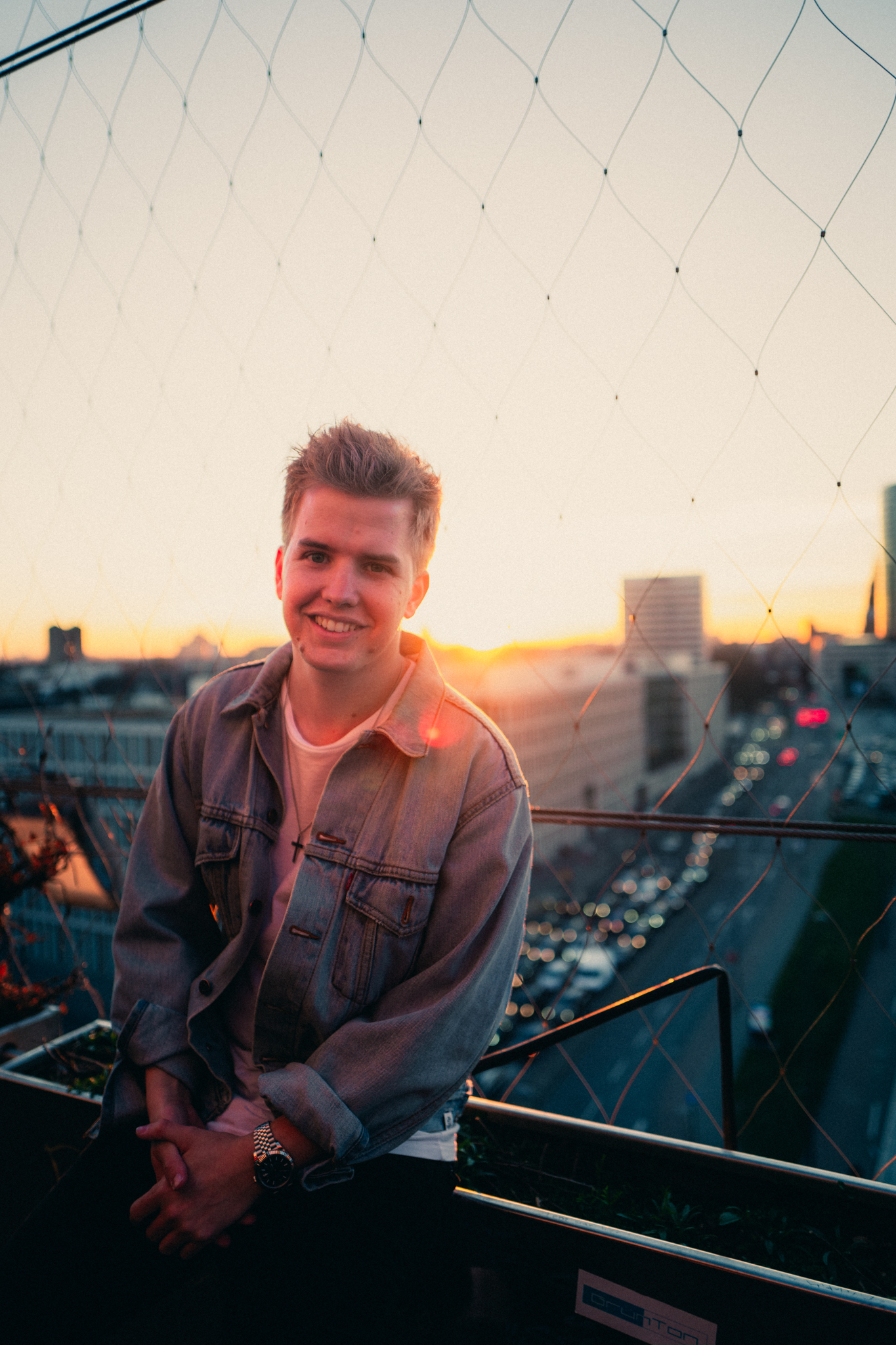 Pressefoto des Musikers Kayef